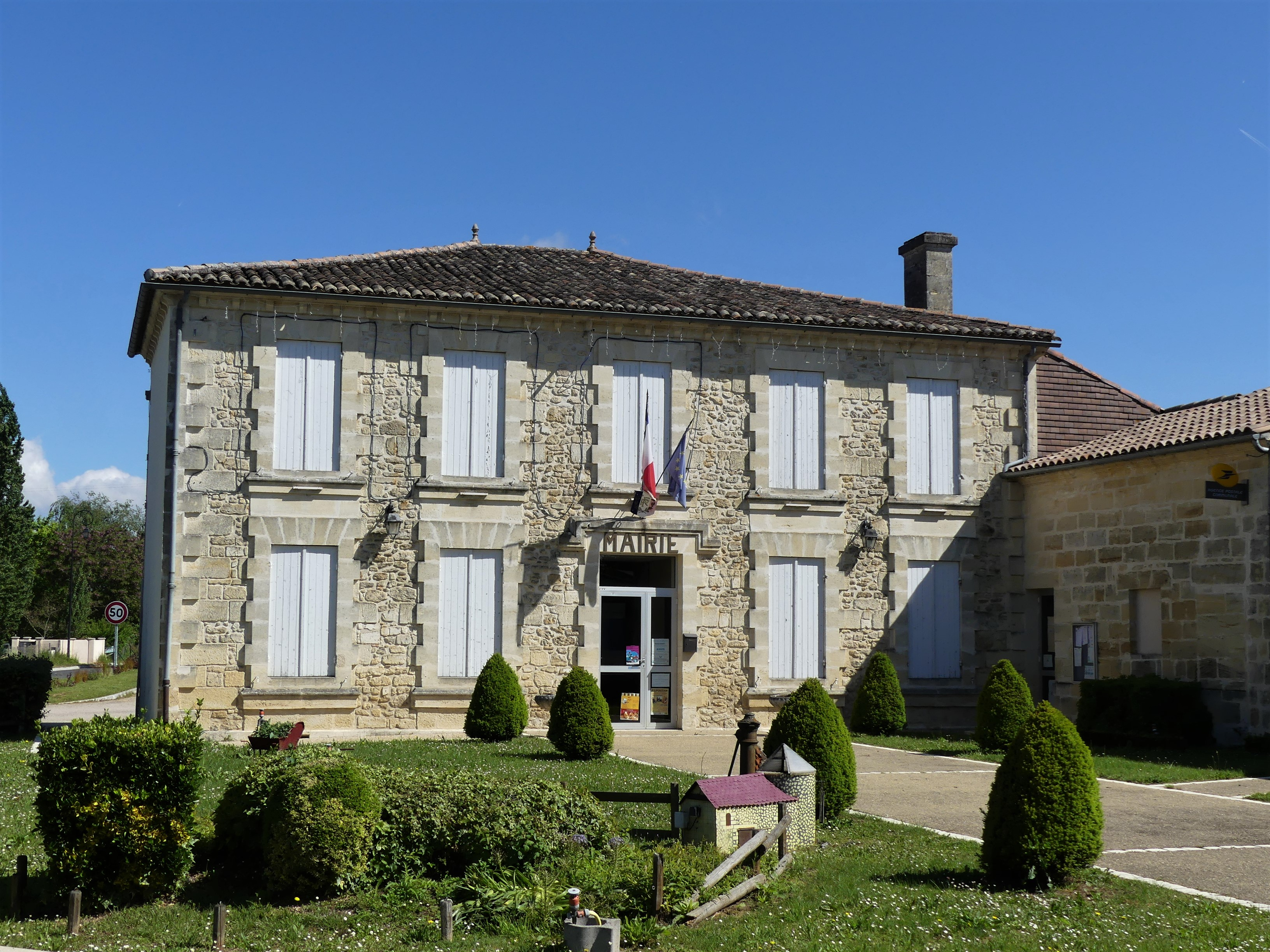 La mairie de Minzac, Dordogne, France.